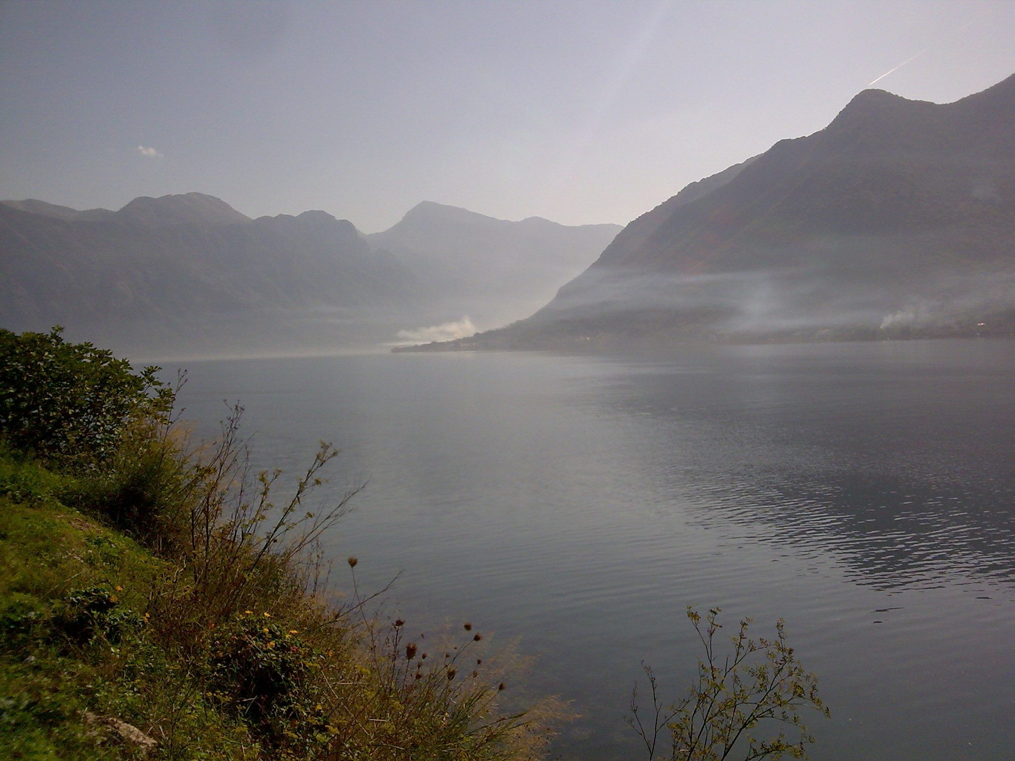 ZALIV